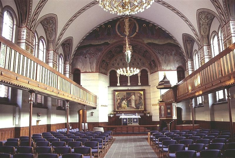 Sions Kirke i Danmark. Skibet set mod øst